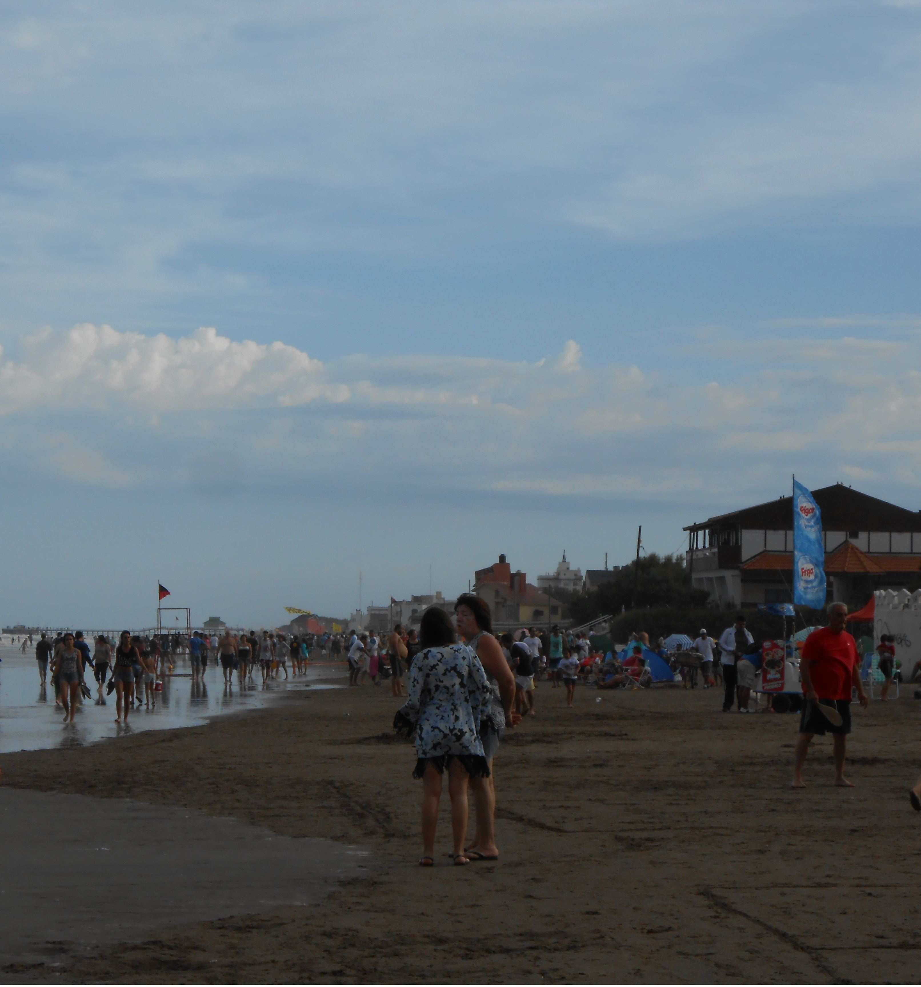 Vista generalizada de la playa de Mar del Tuyú, en Buenos aires, Argentina